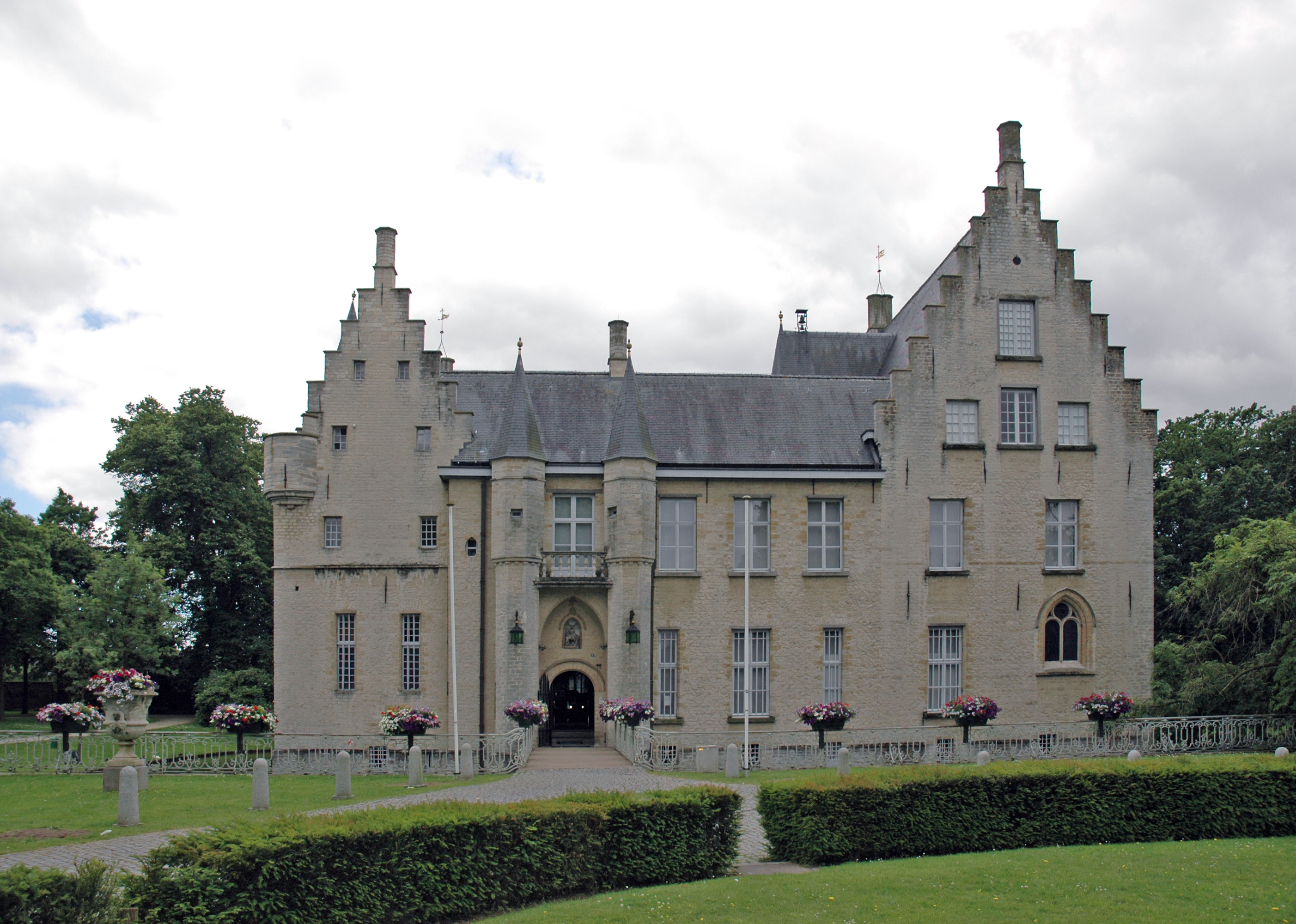 Schloss Cortewalle in Beveren, Ansicht von Nordosten